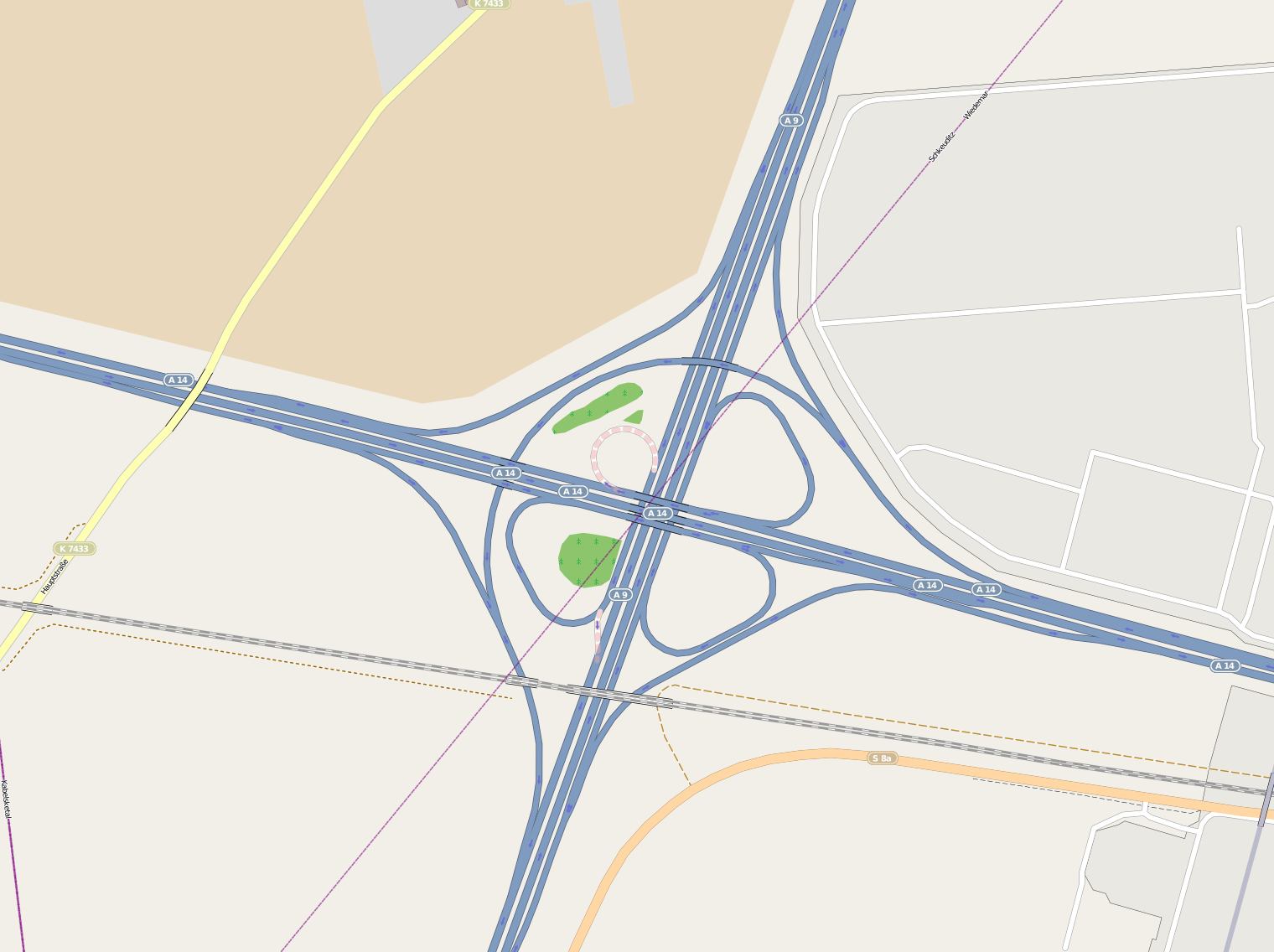 Lage des Schkeuditzer Kreuzes (A14/A9) bei Schkeuditz.